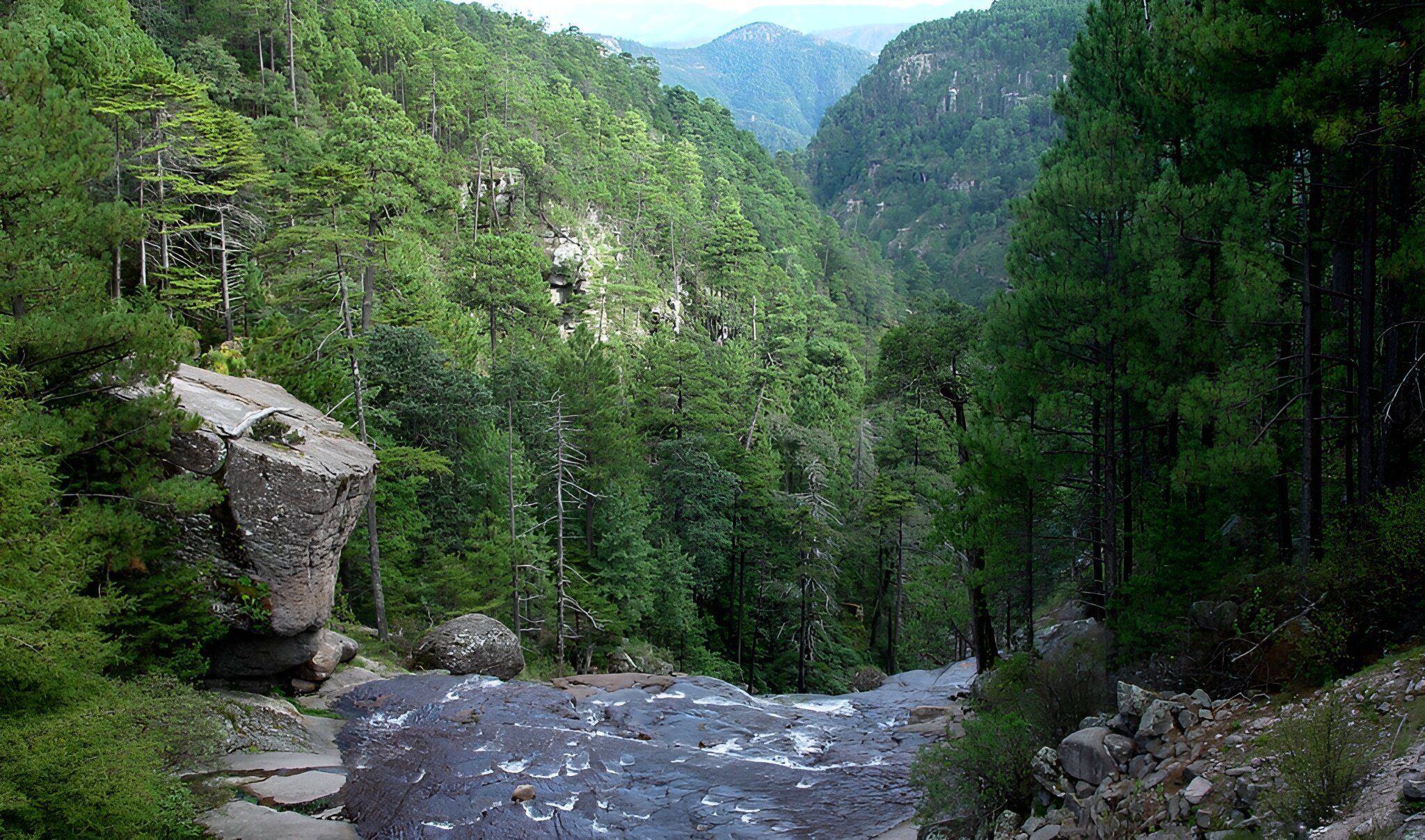 Vista hacia el cañón en el parque Mexiquillo desde el terraplén del ferrocarril.